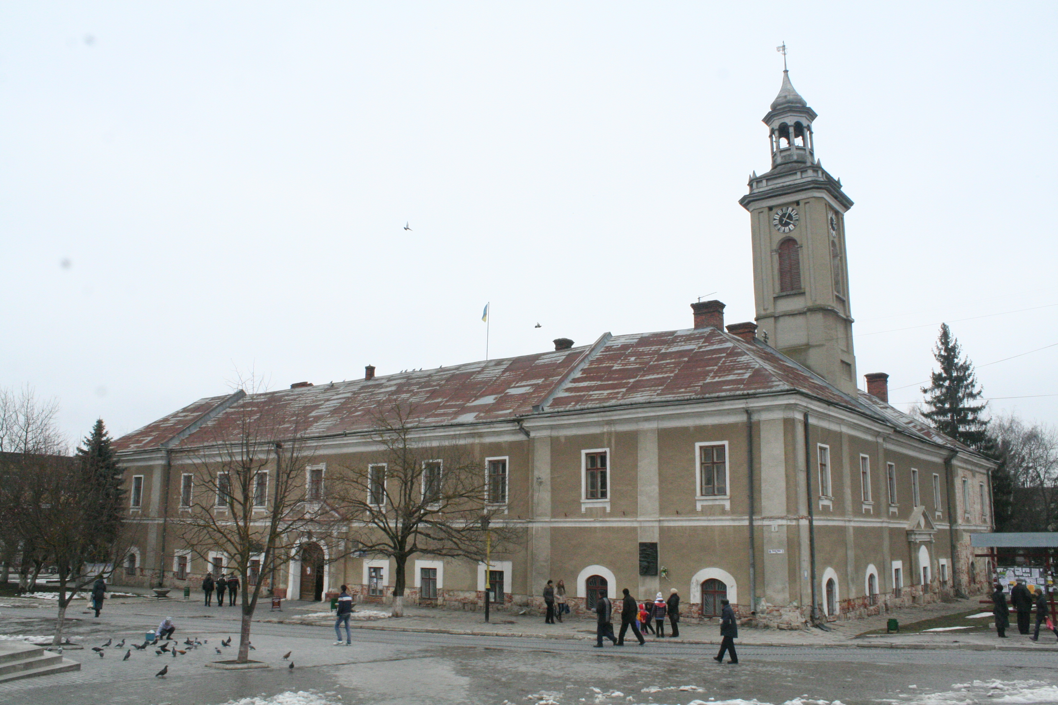 м.Бережани (Тернопільська обл.), пл. Ринок, 1, Бережанська ратуша (будинок колишньої гімназії, в якій вчився Маркіян Шашкевич, вчився і вчив Богдан Лепкий) (мур.), загальний вигляд